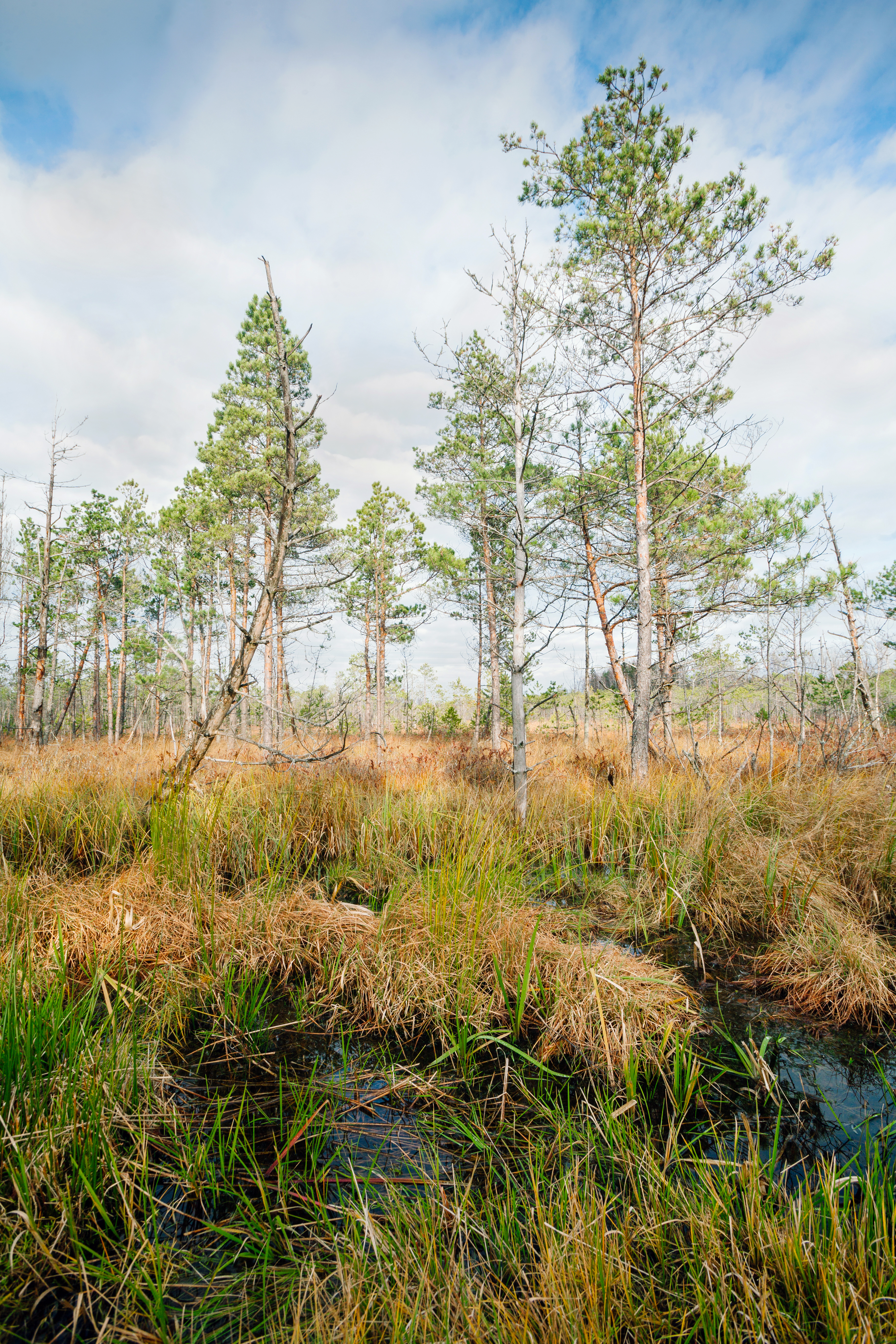 Гидрологический заказник республиканского значения «Острова Дулебы»Беларуская (тарашкевіца): Гідралягічны заказьнік рэспубліканскага значэньня «Астравы Дулебы»